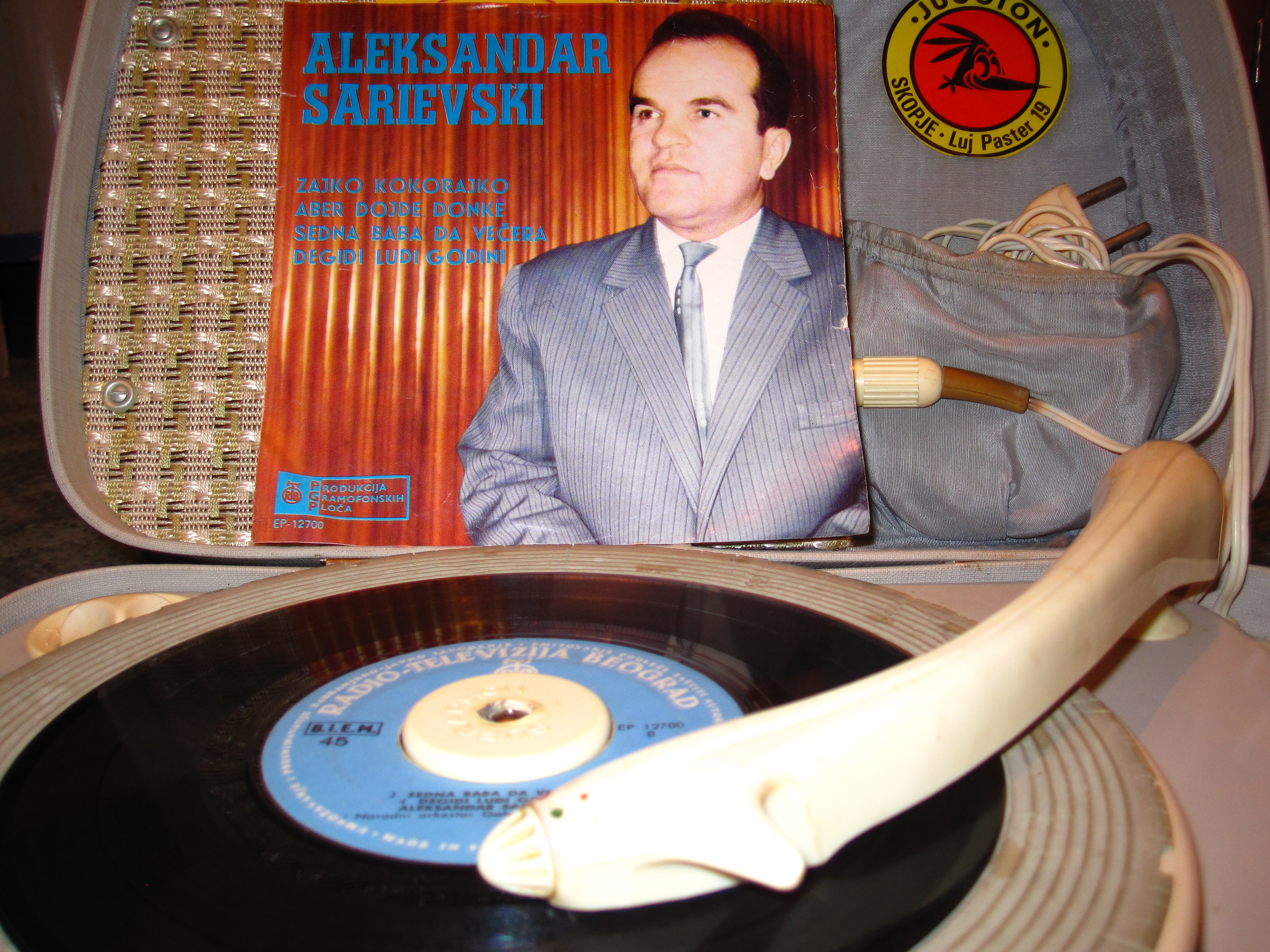 Грамофонска плоча - Македонски песни - Александар Сариевски. („Зајко кокорајко“, „Абер дојде Донке“, „Седна баба да вечера“, „Дејгиди луди години“)